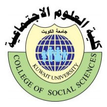 كلية العلوم الاجتماعية - جامعة الكويت